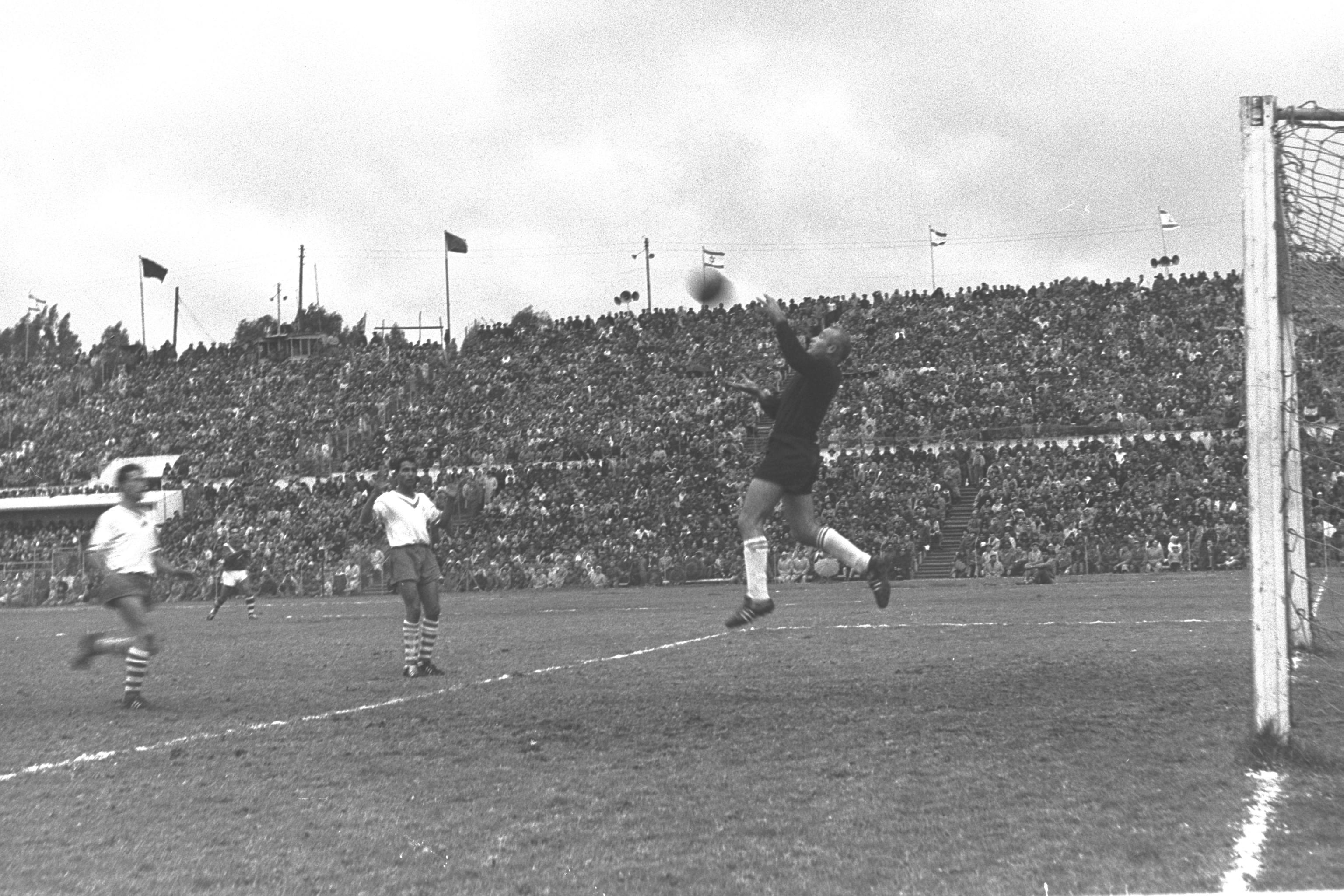 The National Cup Soccer final between Hapoel Tel Aviv and Hapoel Petah Tikva, held at the Ramat Gan Stadium. גמר גביע המדינה בכדורגל בין הפועל תל אביב והפועל פתח תקווה, באיצטדיון רמת גן